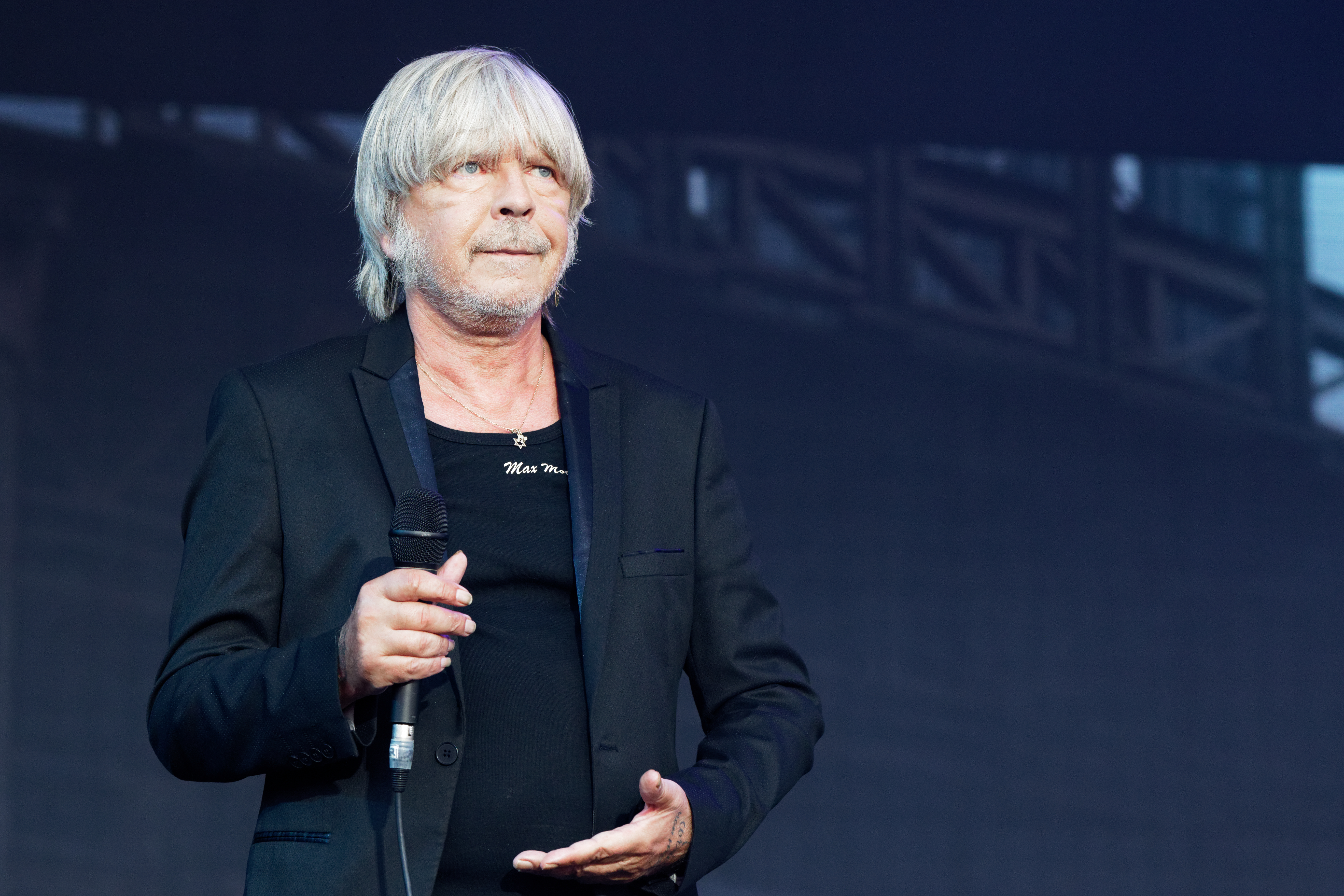 Renaud en concert lors du festival des vieilles charrues 2017.